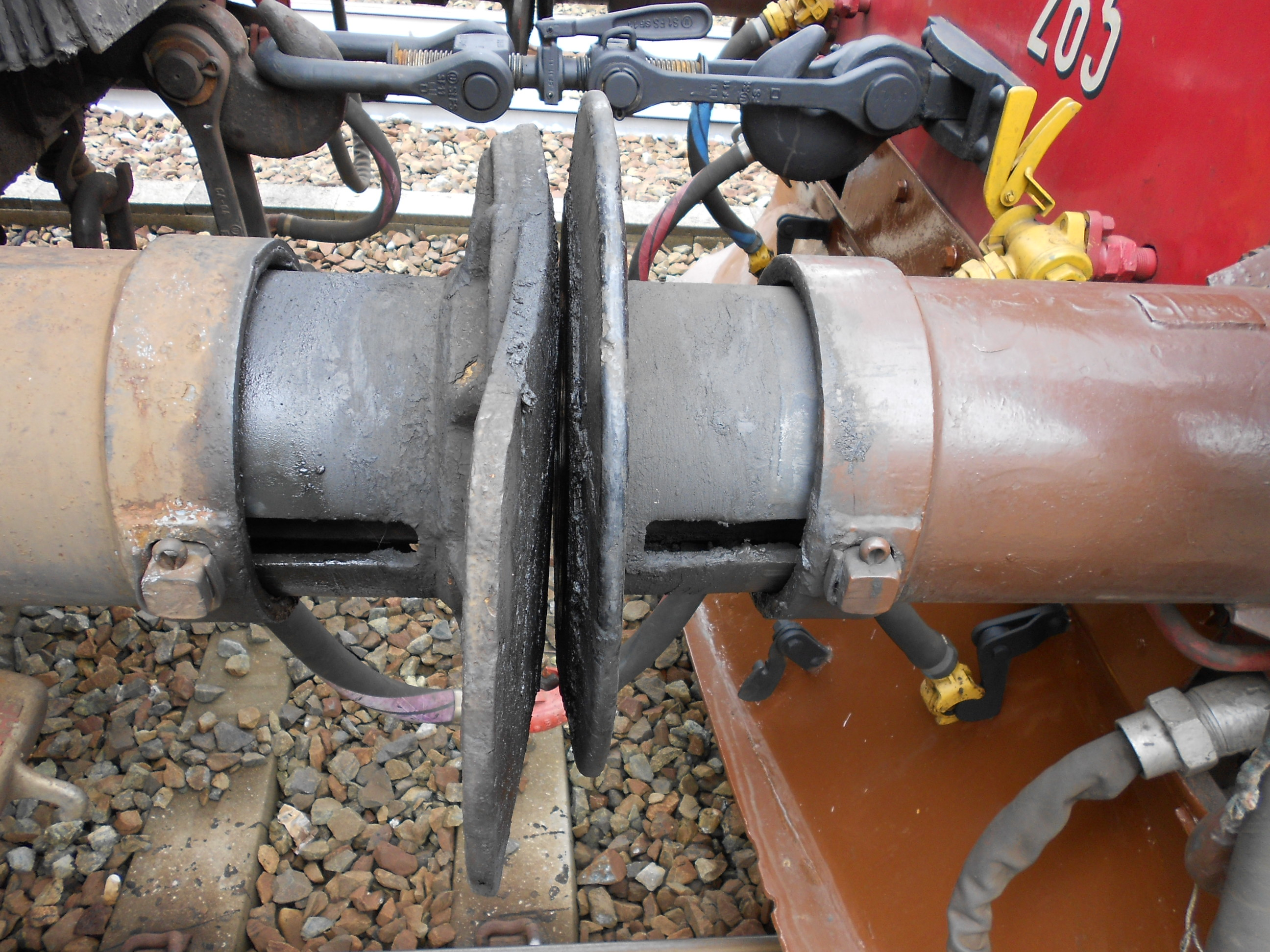 respingenti di locomotore elettrico e carrozza ferroviaria (a sinistra) agganciati tra loro